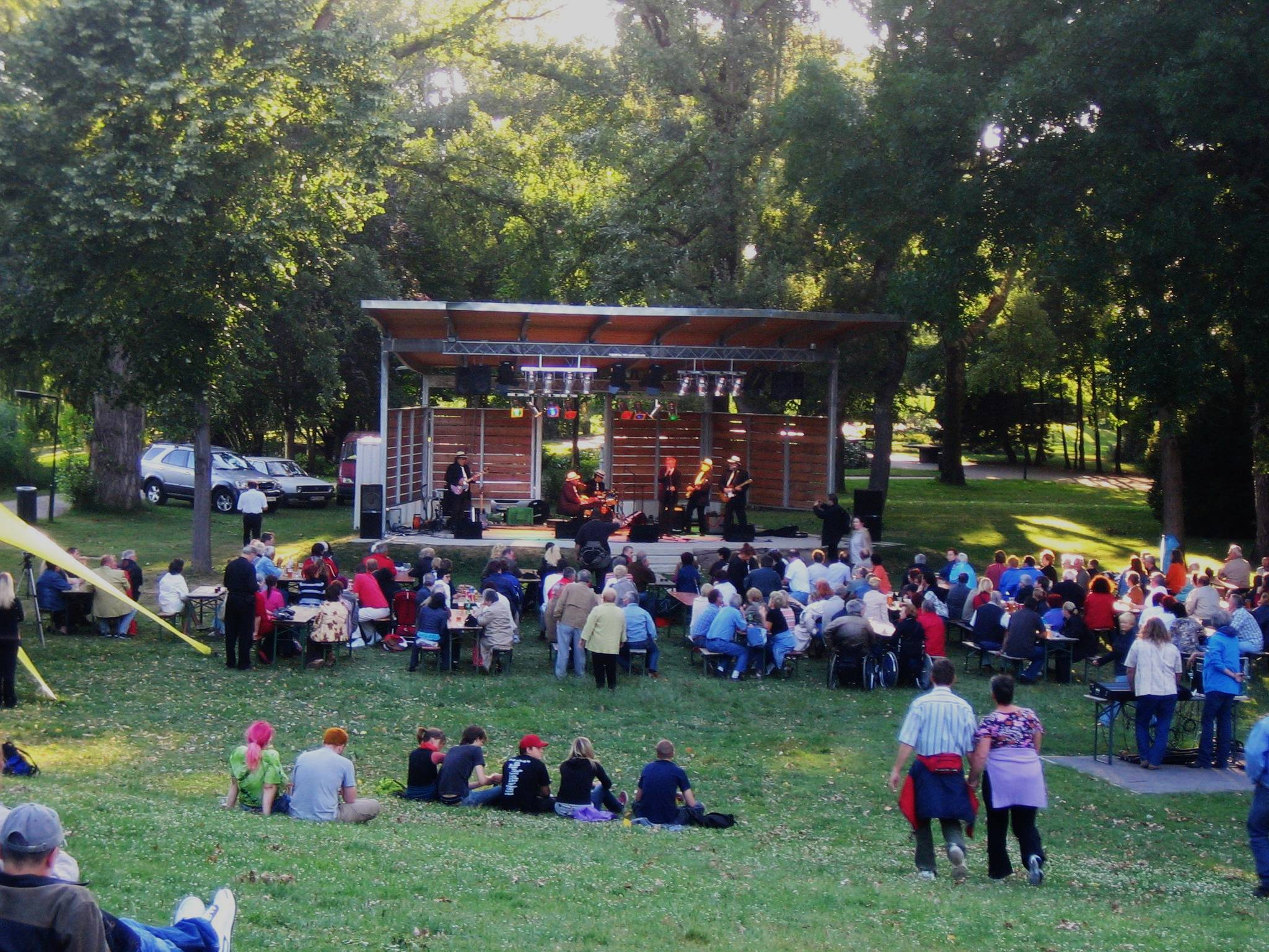 Donaupark, Vienna; Donauparkbühne